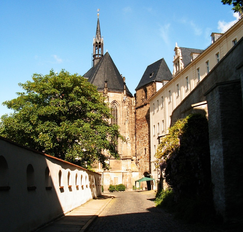 Schloss Altenburg